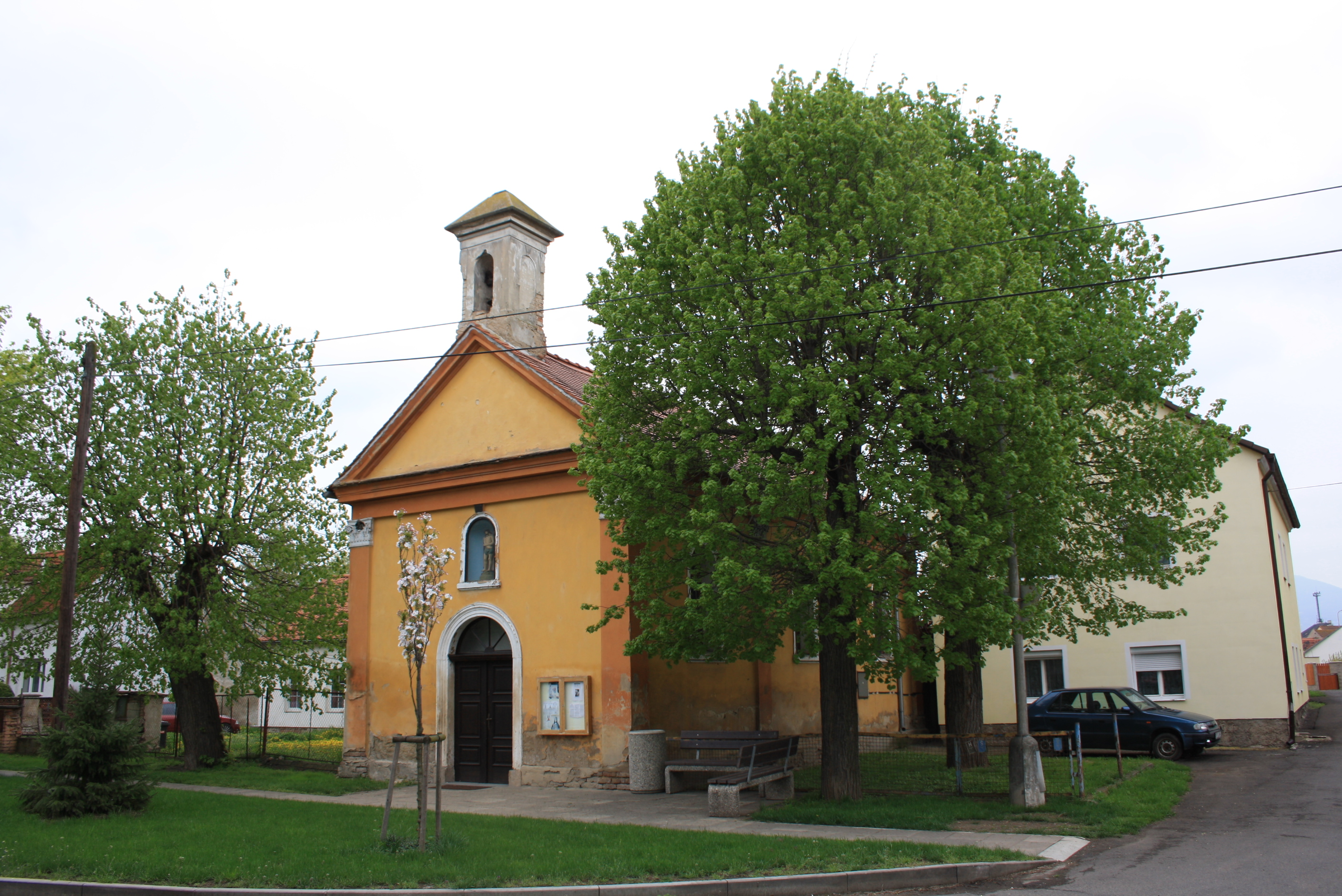 Kaplička v Lukavci v okrese Litoměřice (pohled od východu).